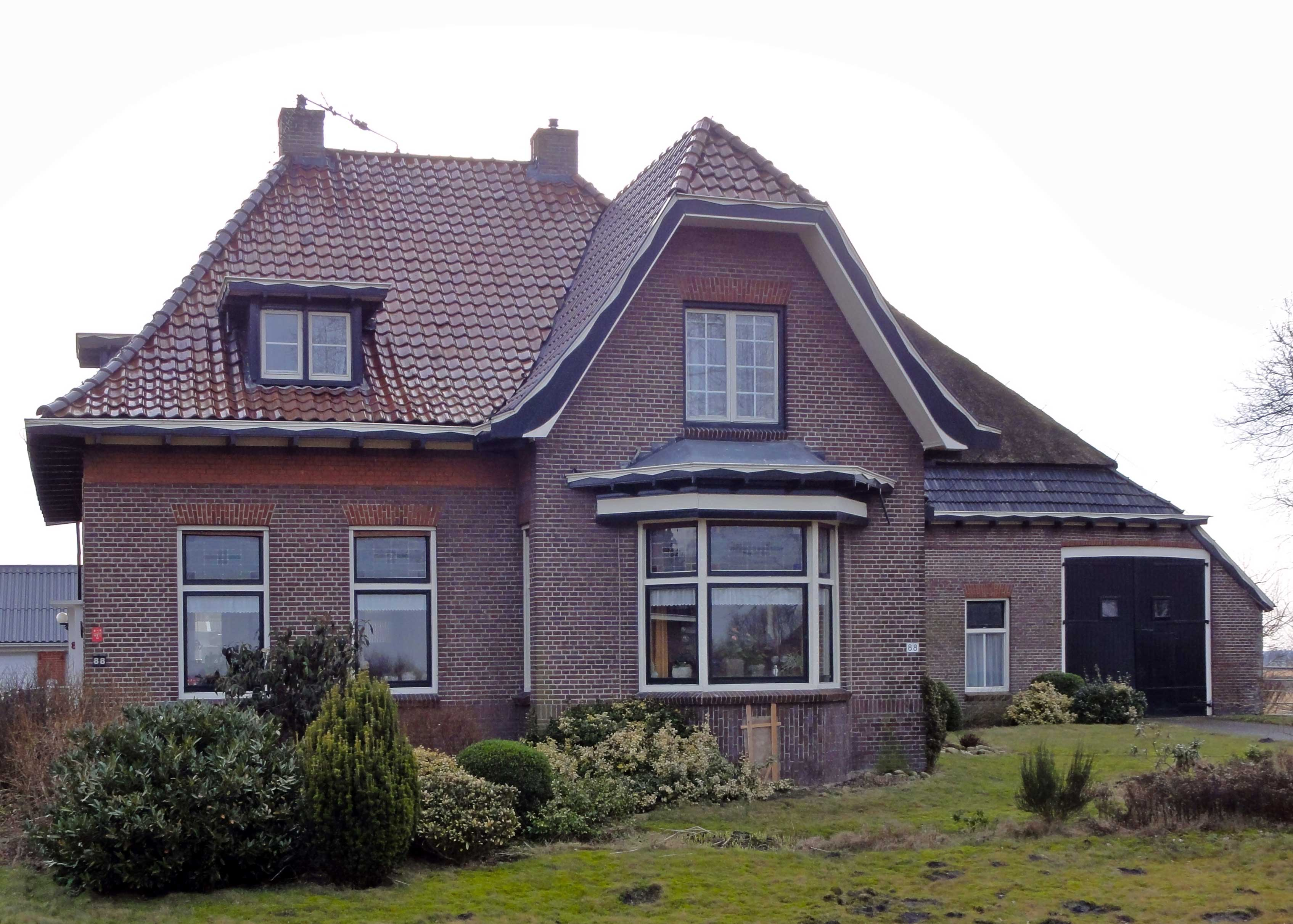 Villaboerderij Dorpsstraat 88 in Eexterveen, provinciaal monument